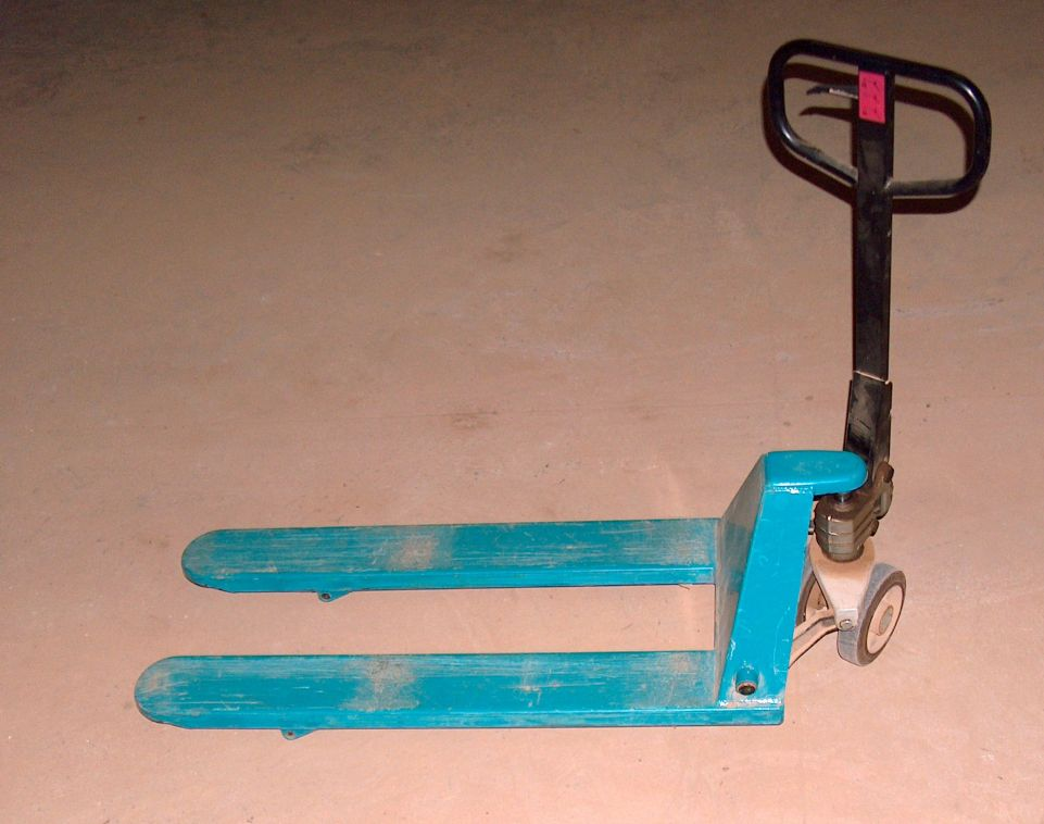 Hubwagen